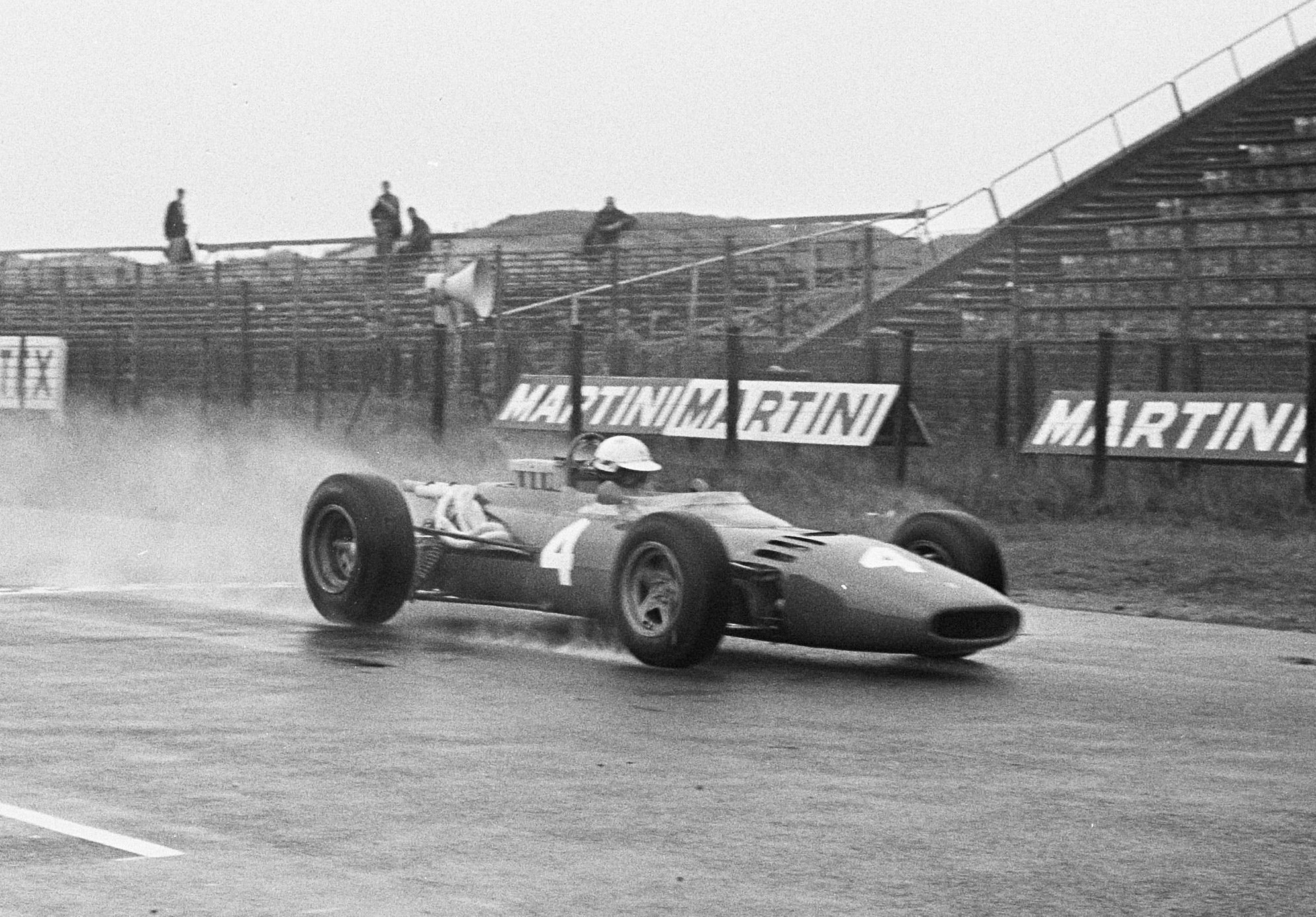 Grand Prix Zandvoort.